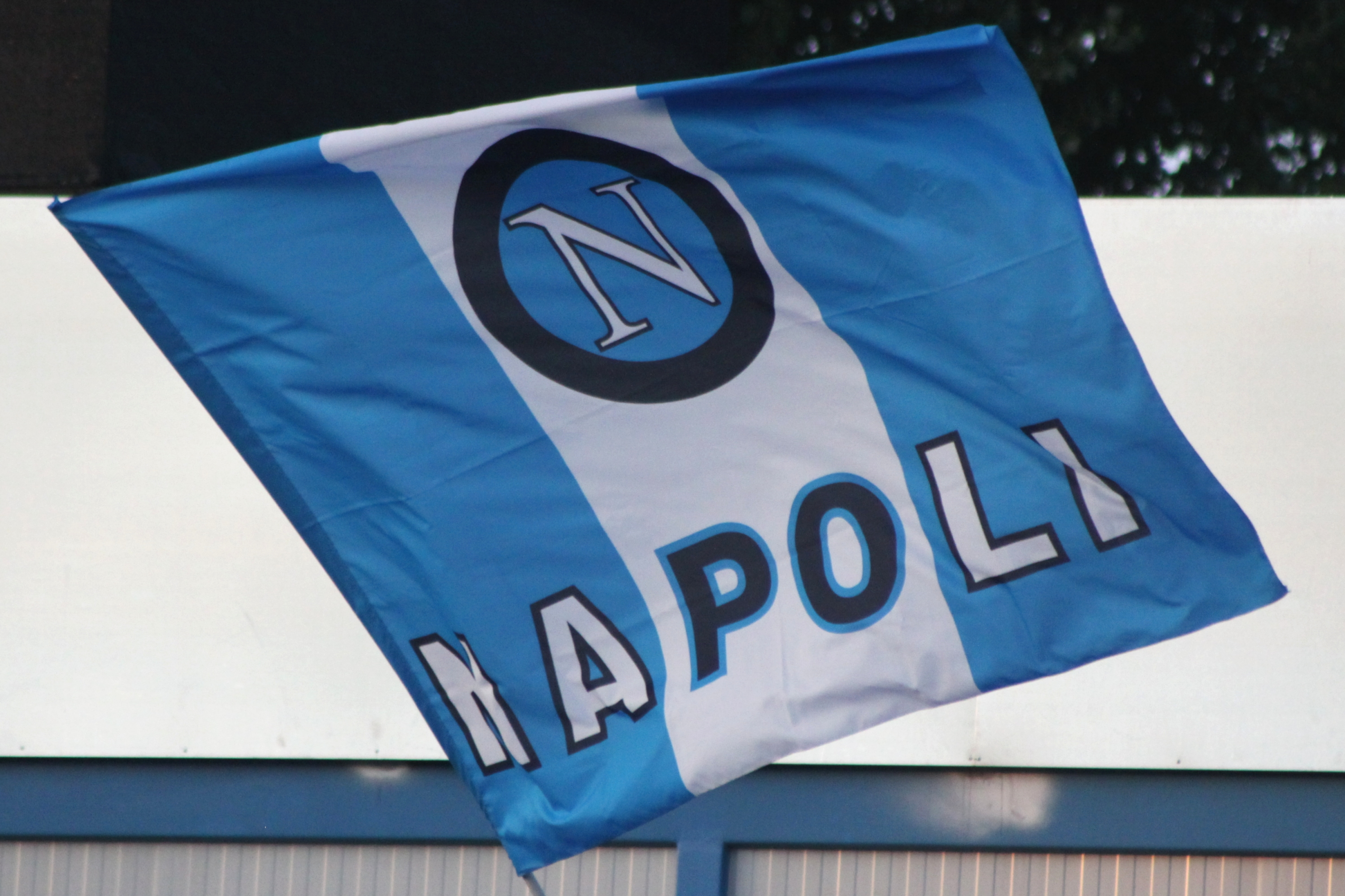 SSC Napoli Flag Bandiera SSC Napoli